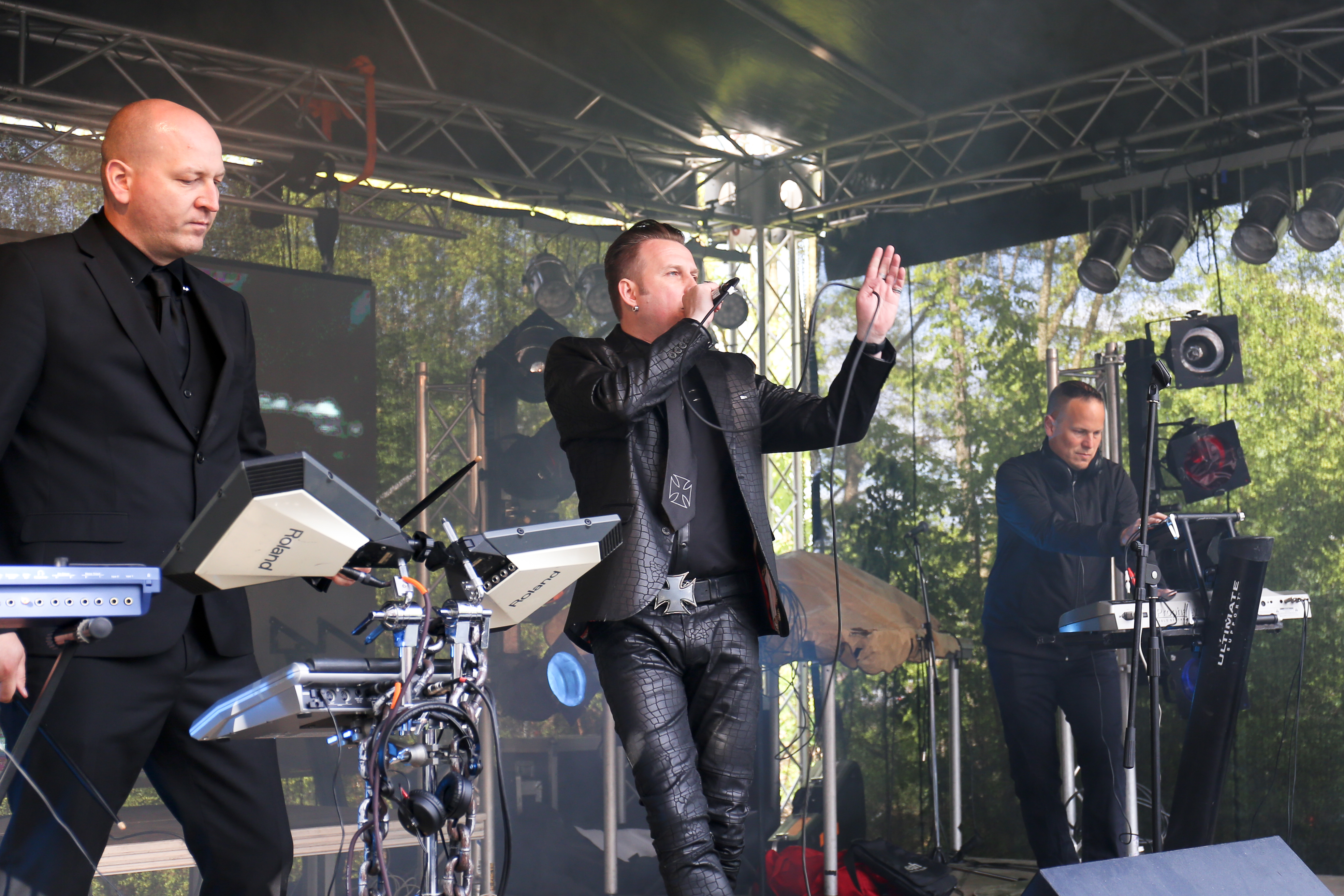 Die Electro-Industrial-Band Lights of Euphoria auf dem Wave-Gotik-Treffen 2016 im Non Tox in Leipzig.